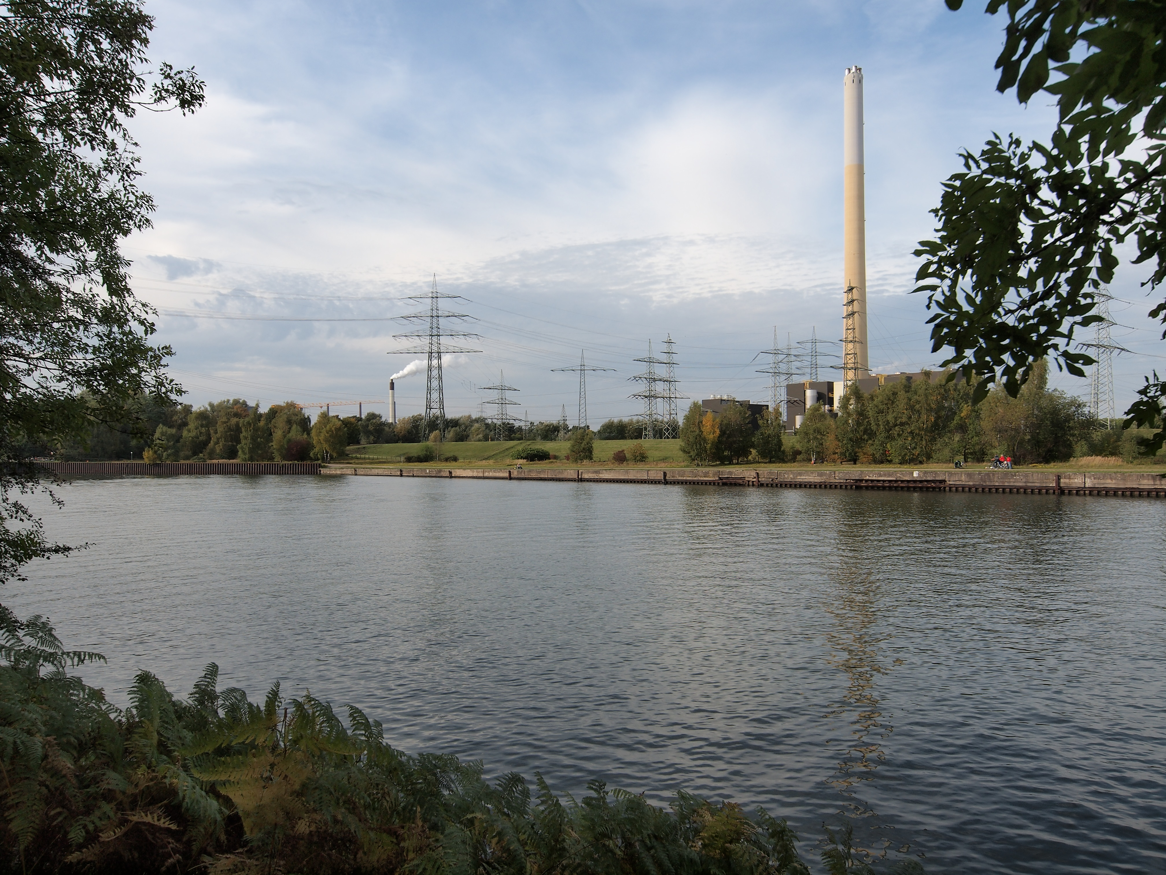 Hafen der ehemaligen Zeche Mathias Stinnes am Rhein-Herne-Kanal in Essen, zur Zeit ohne Nutzung. Der große Schornstein gehört zum Müllheizkraftwerk Karnap